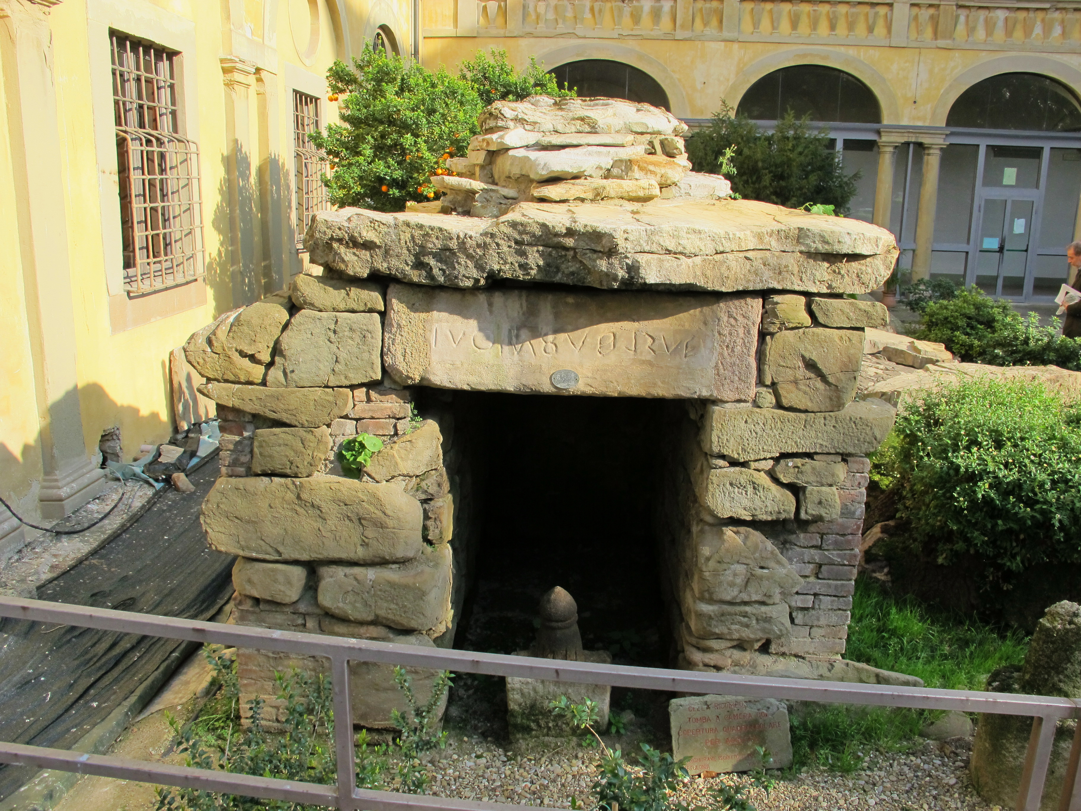 Palazzo della Crocetta, Firenze